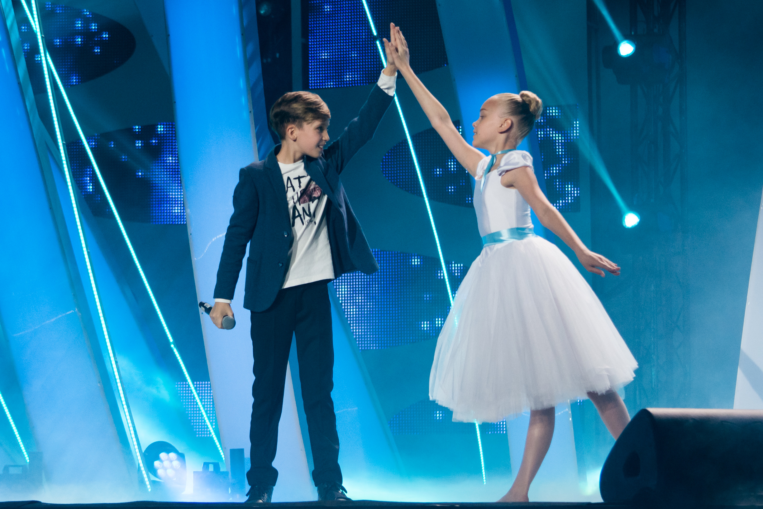 Михаил Смирнов на финале российского отбора на Детское Евровидение 2015